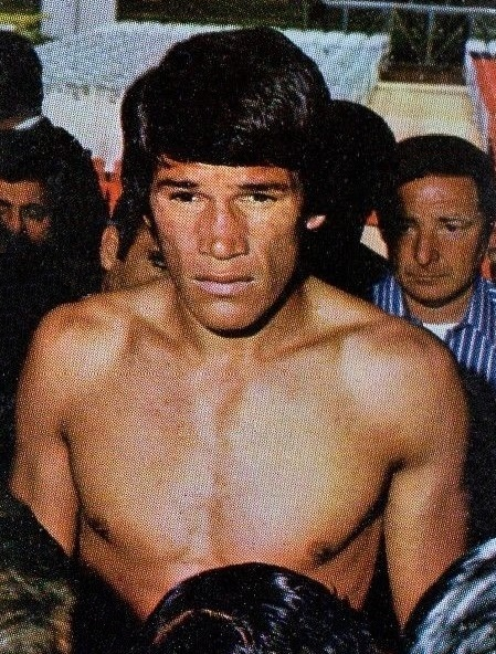 CAMPIONI dello SPORT 1973/74-Figurina n.291- MONZON -PUGILATO-Rec